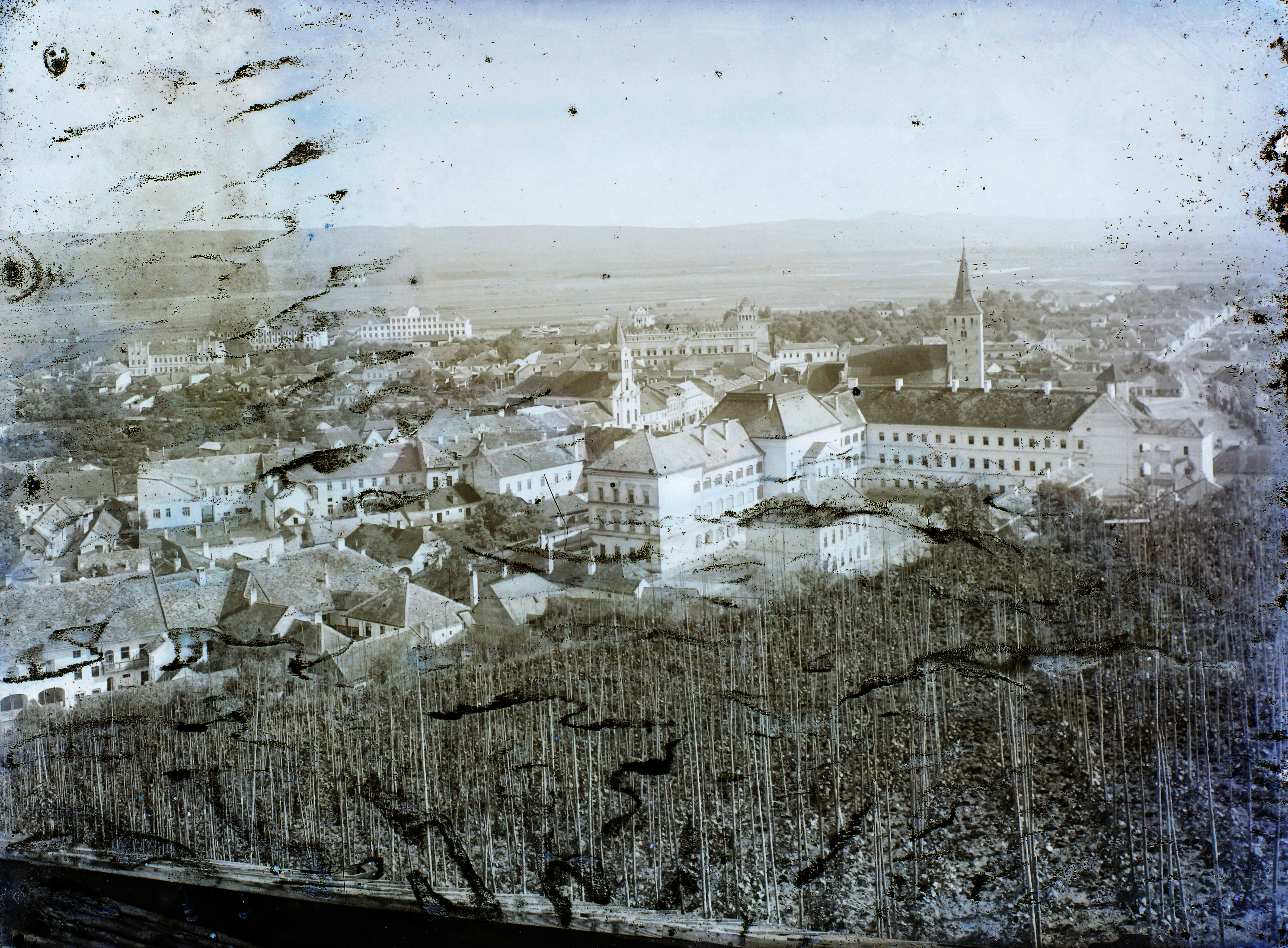 a város látképe. Jobbra a kollégium épülete, mögötte a vártemplom, balra a katolikus templom. Location: Romania, Transylvania, Aiud Tags: picture, bird's eye view Title: a város látképe. Jobbra a kollégium épülete, mögötte a vártemplom, balra a katolikus templom.